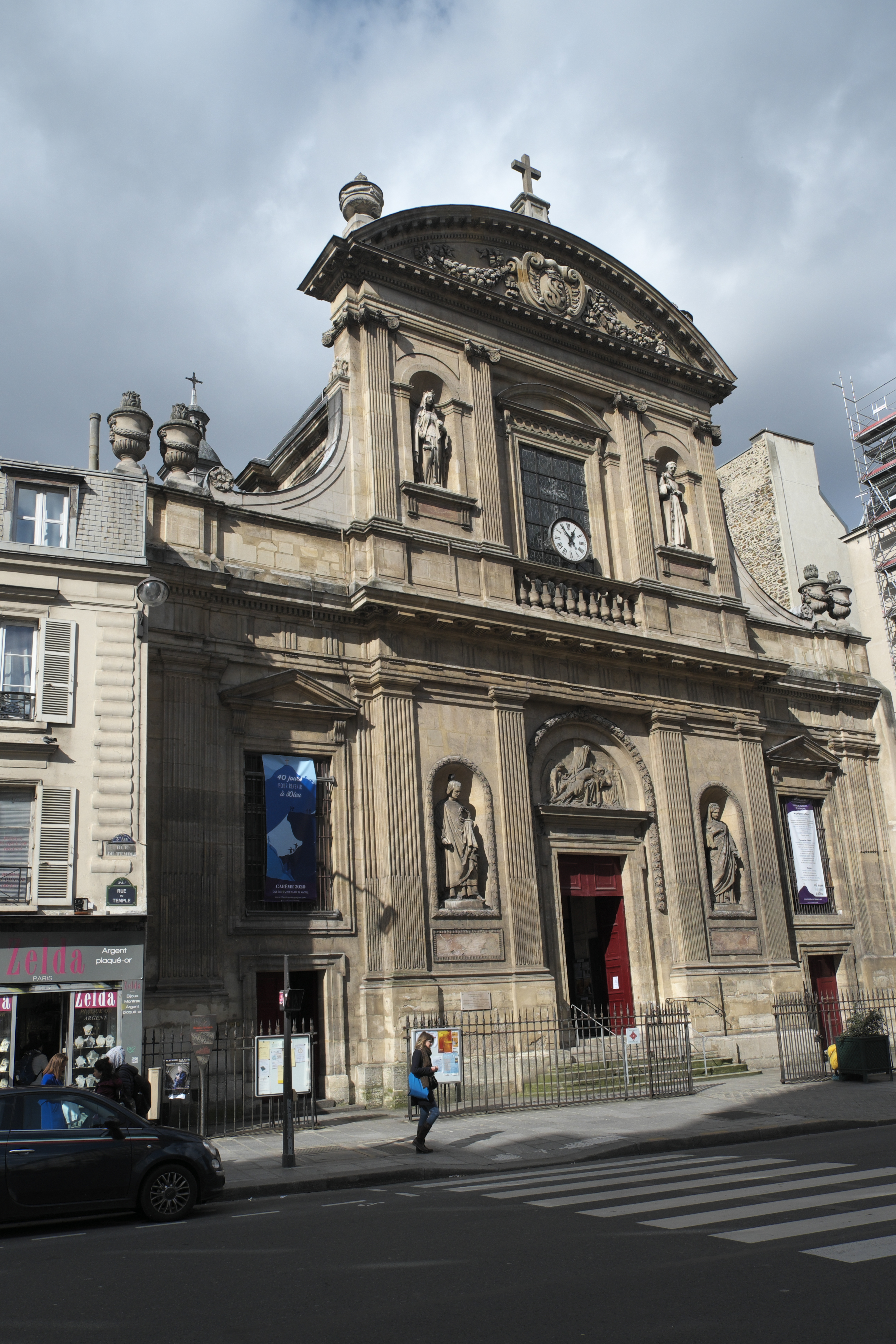 Katholische Pfarrkirche Ste-Élisabeth im 3. Arrondissement in Paris (Île-de-France/Frankreich)